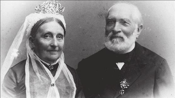 Gothas OB Carl Heinrich Hünersdorf mit Gattin Sophie am Tage ihrer Goldenen Hochzeit